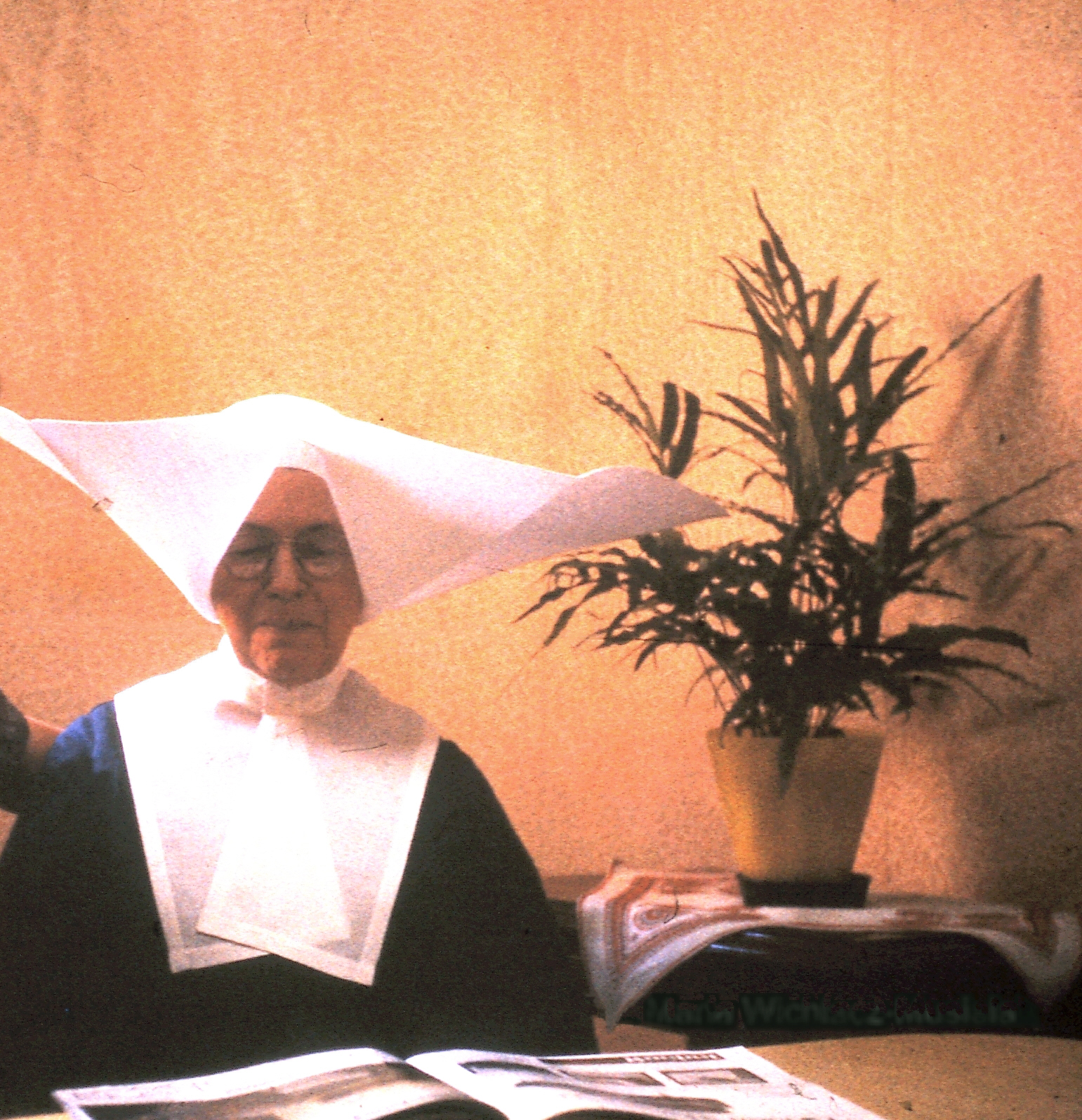 Sœur Jean Gabriel Batke, daughter of charity of Saint Vincent de Paul, Poland